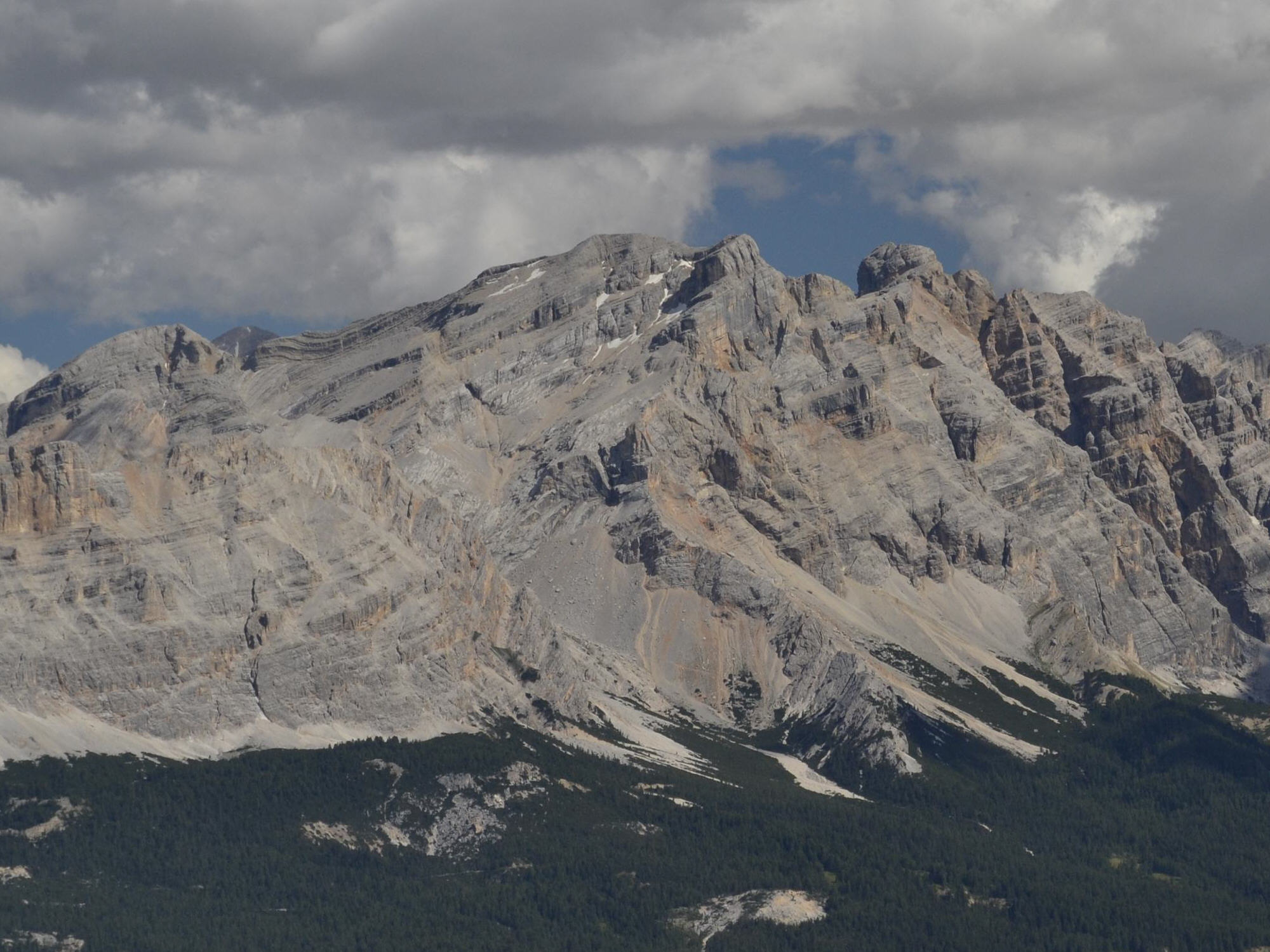 Piz Lavarela und Piz Cunturines von der Peitlerscharte aus betrachtet